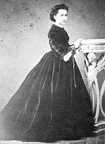 Elena Raffalovich (1842-1918)